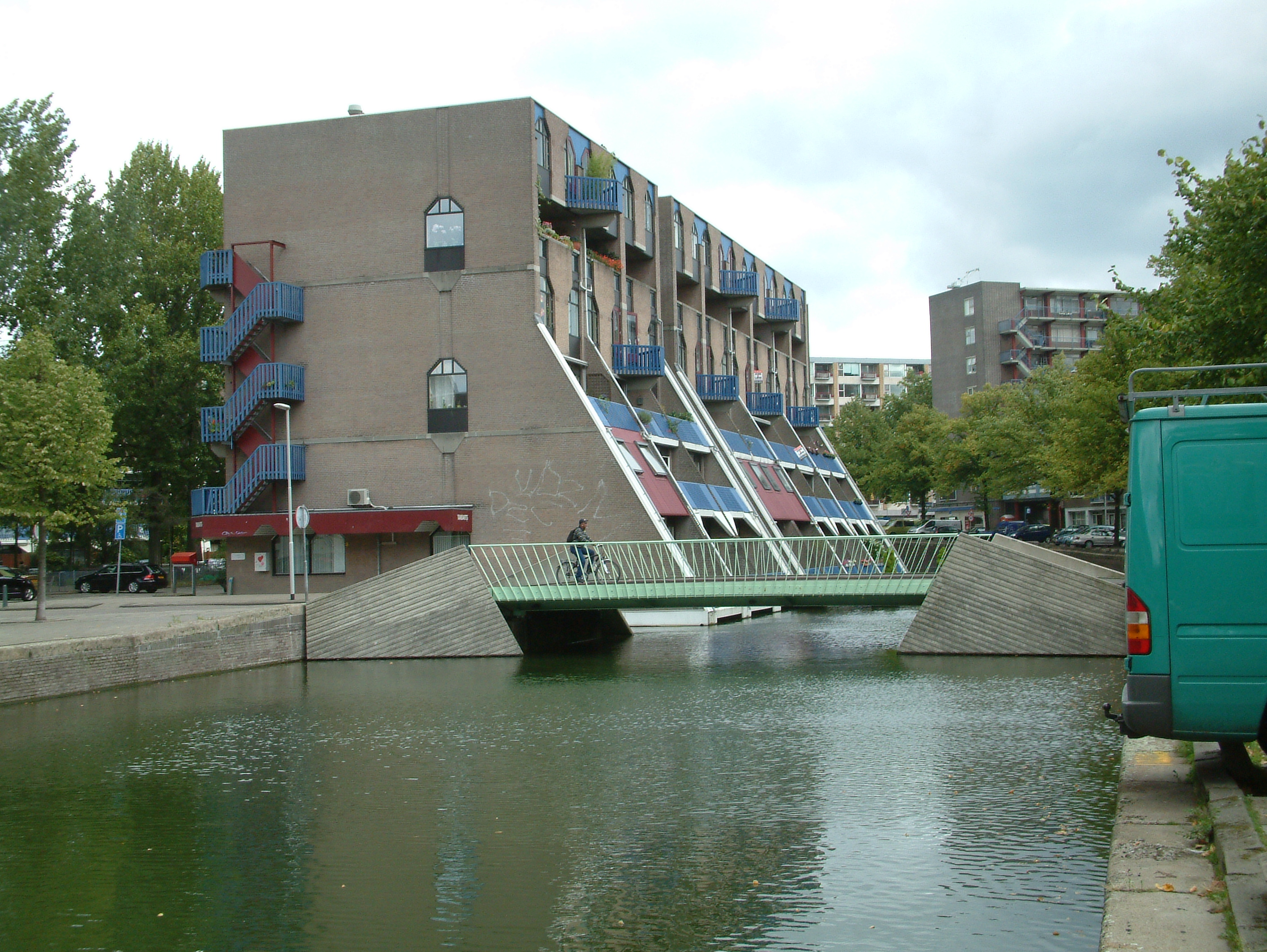 Bruggen over de Rotte, de Sint-Jacobsbrug, westkant